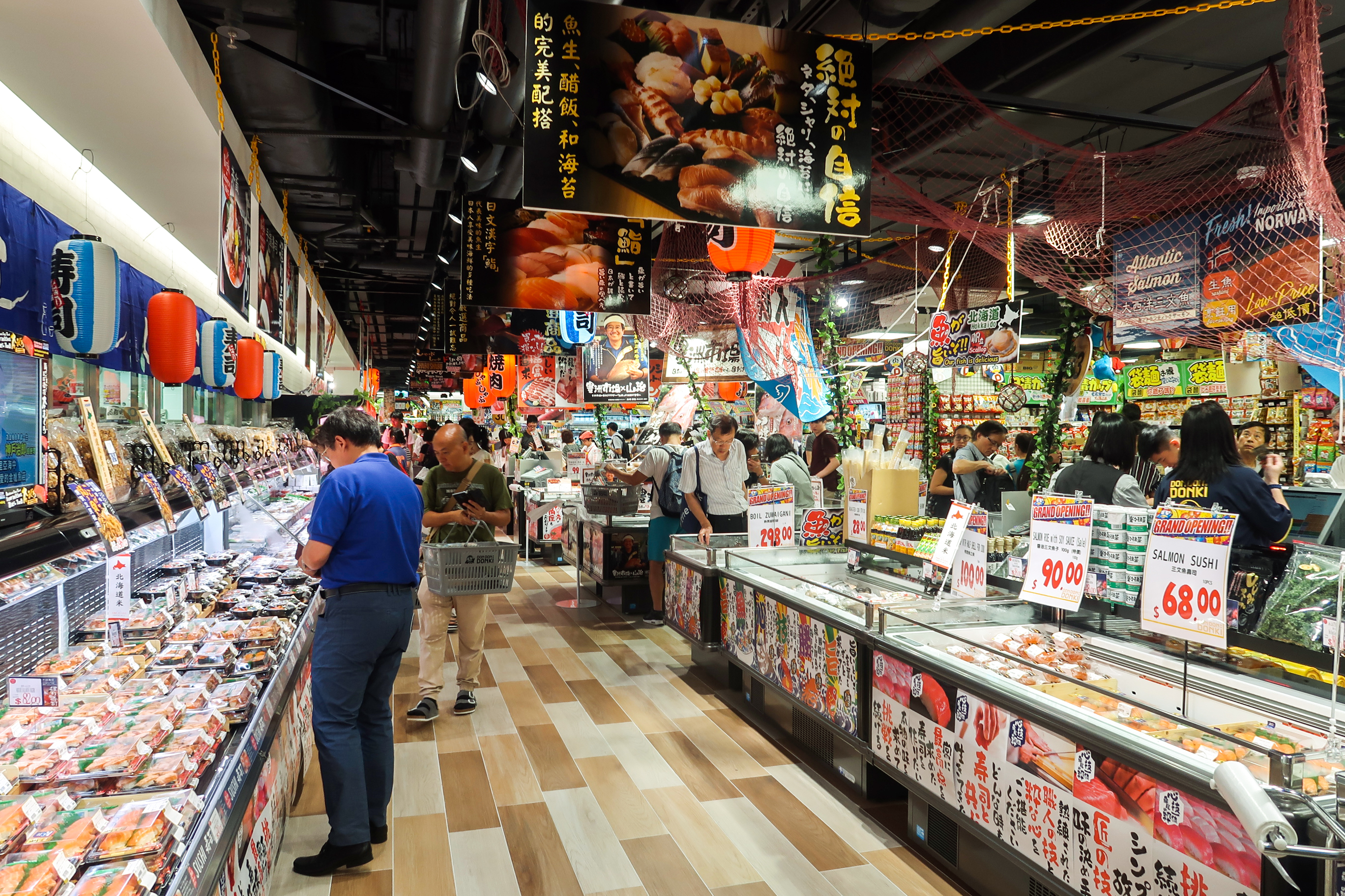 Don Don Donki Hong Kong Interior